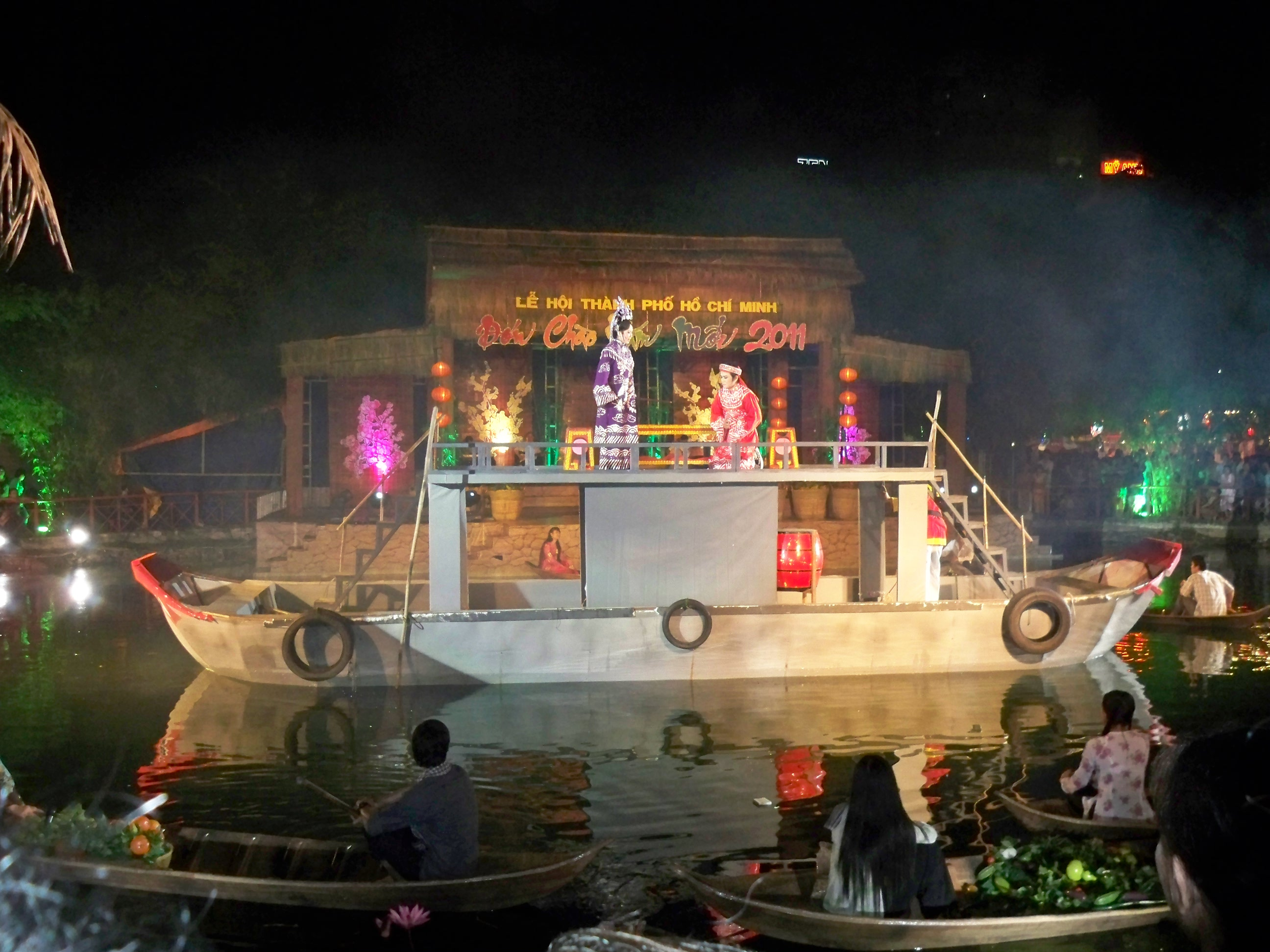 Trích đoạn Tự Đức dâng roi trên thuyền - Phan Minh Châu chụp tại lễ hội ẩm thực 2010